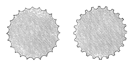 [links] Dorische [rechts] Ionische u. Korinthische Kannelierung.